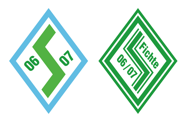 Historisches Wappen der SpVgg Fichte